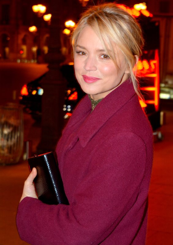 Virginie Efira à la soirée "Révélations 2017" des César du cinéma